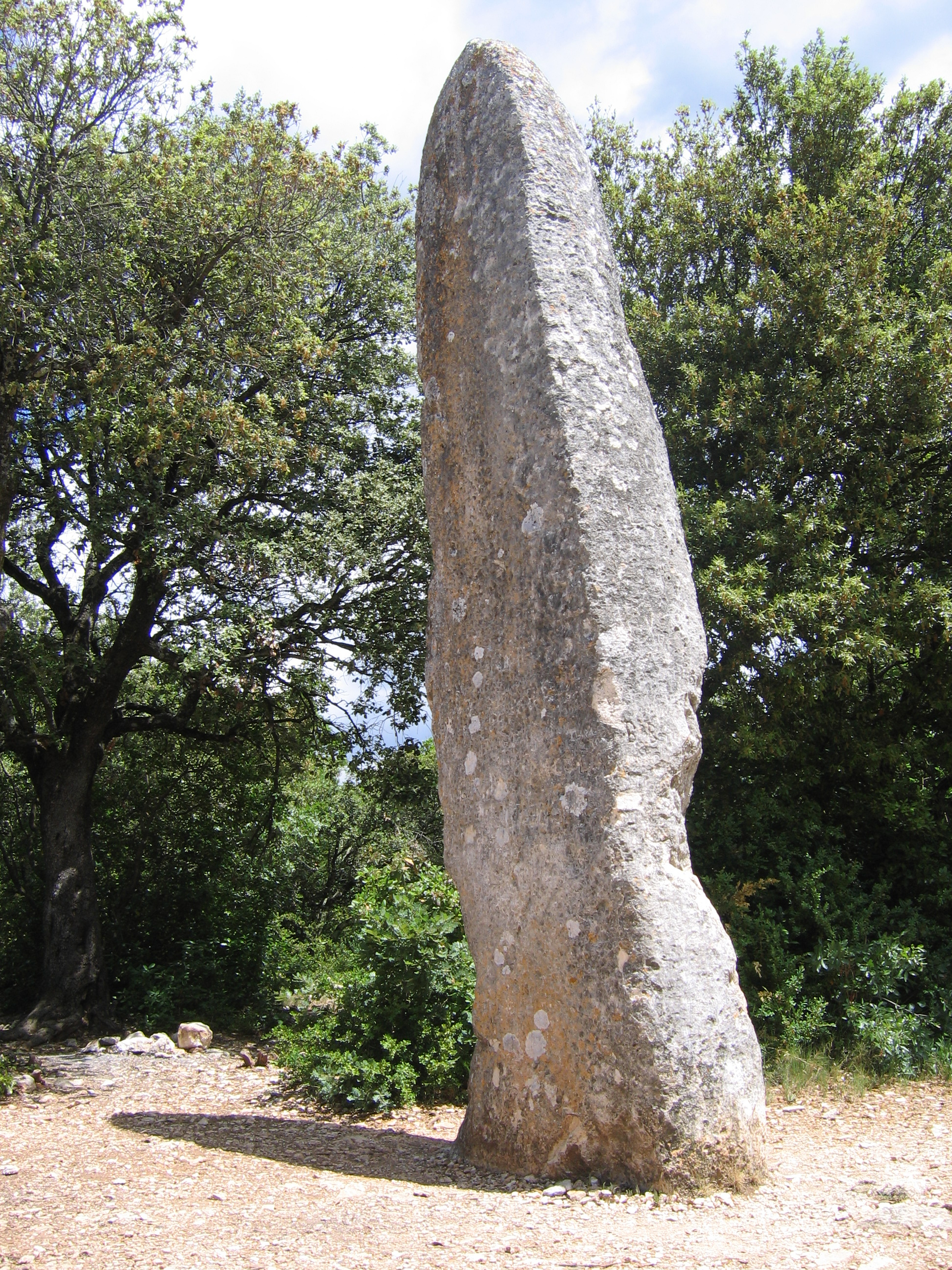 Description: Menhir de la Pierre Plantée, Lussan Gard, France Source: Hugo Soria Licence: GFDL